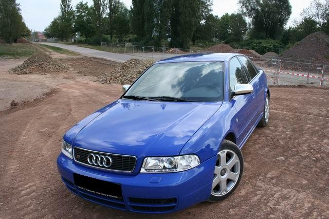 Audi S4 B5 Nogaroblau